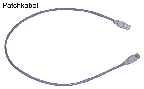 Patchkabel, Kategorie 5